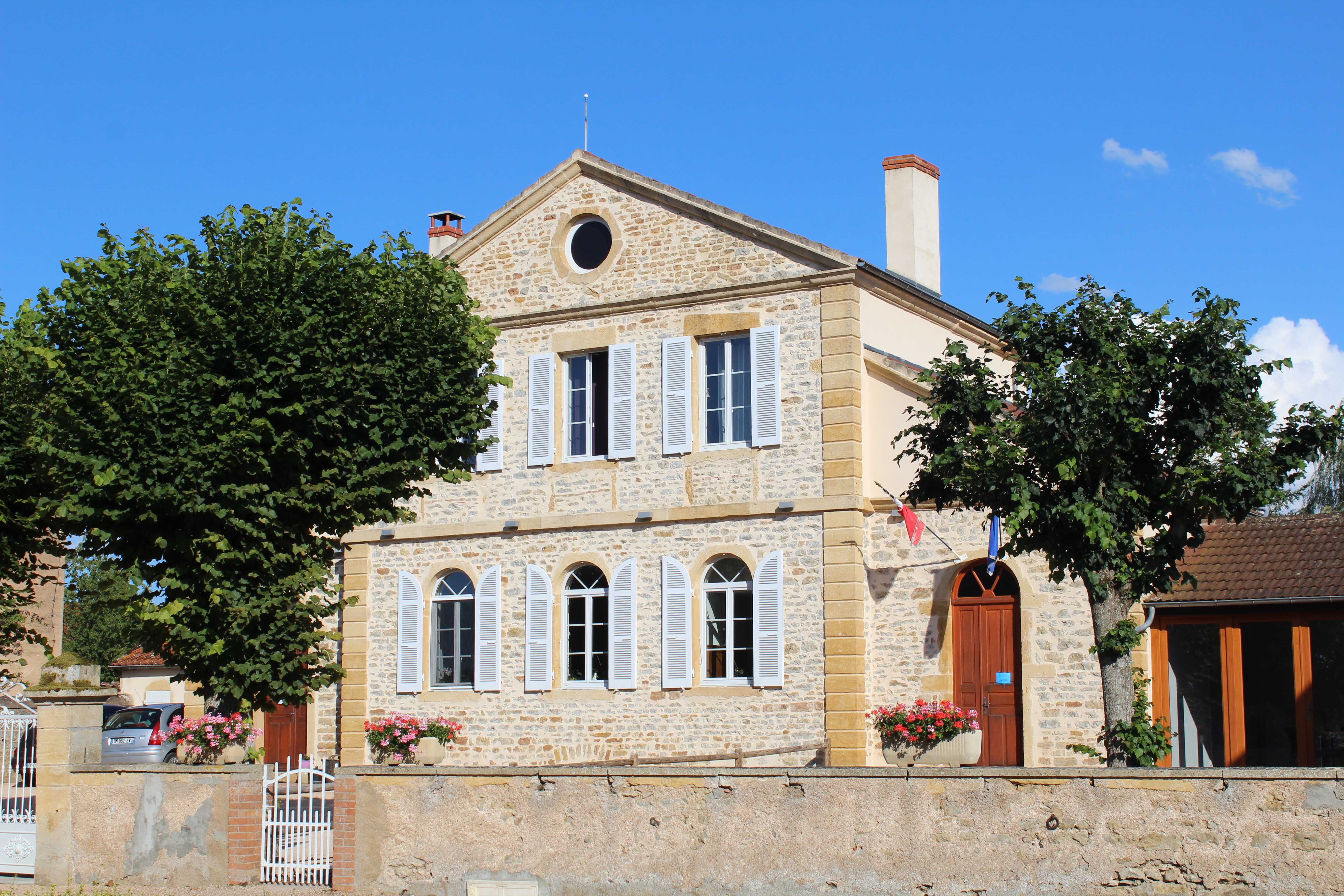 Mairie de Saint-Didier-en-Brionnais.